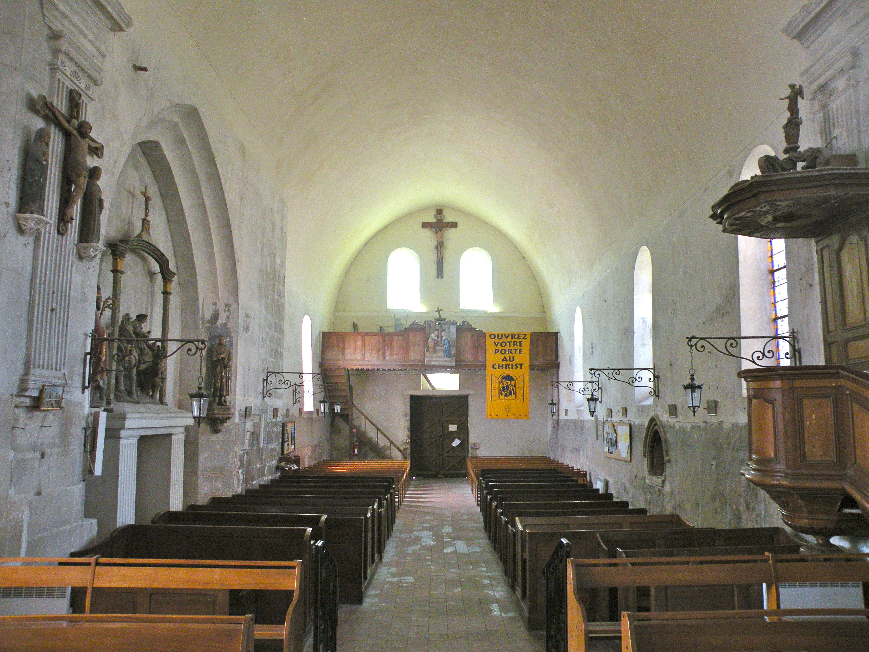 Église Saint-Denis de Sérifontaine nef